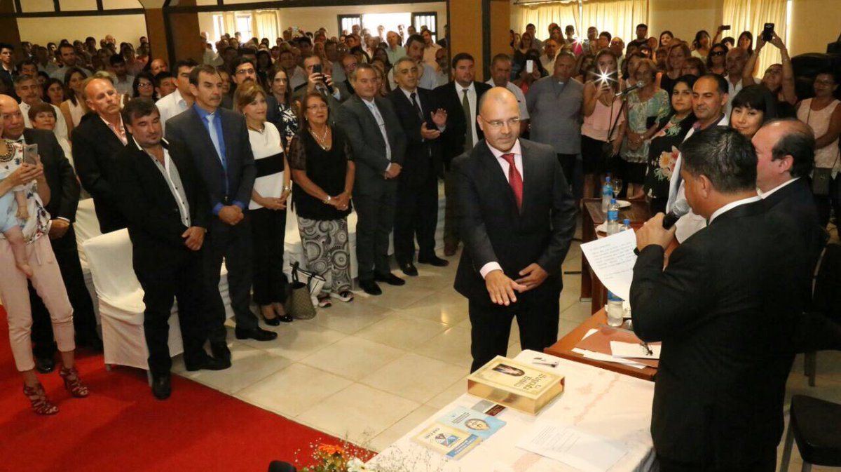 El Intendente de Caá Catí, Jorge Meza, jurando al cargo el 9 de diciembre de 2017.